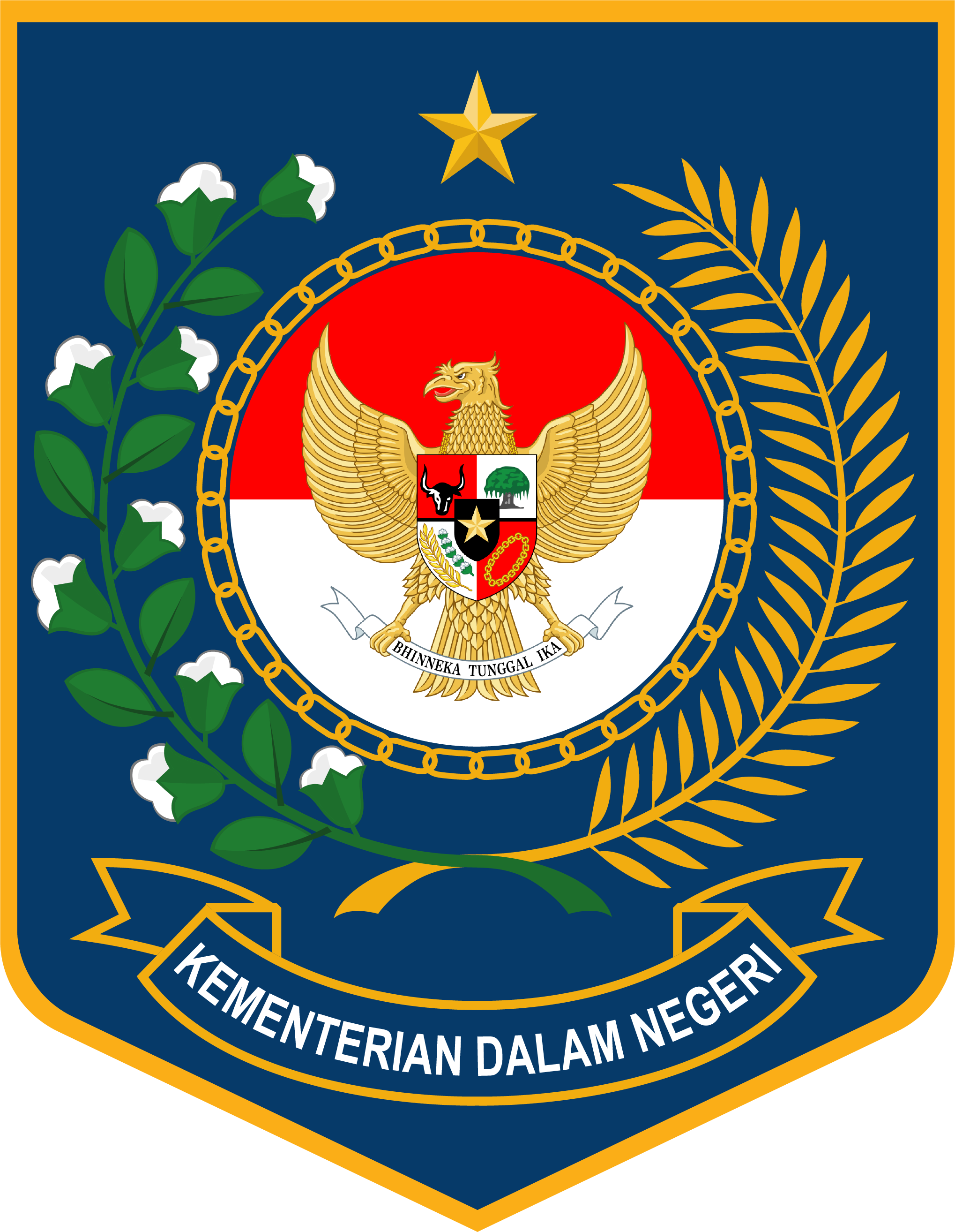 Logo Kementerian Dalam Negeri Republik Indonesia. Logo berdasarkan Peraturan Menteri Dalam Negeri Nomor 37 Tahun 2020 dengan spesifikasi penambahan bintang dan penggunaan lambang pancasila dan rantai yang mengelilingi bendera merah putih.